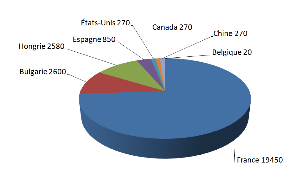 Volumes de production du foie gras en 2010 par pays (